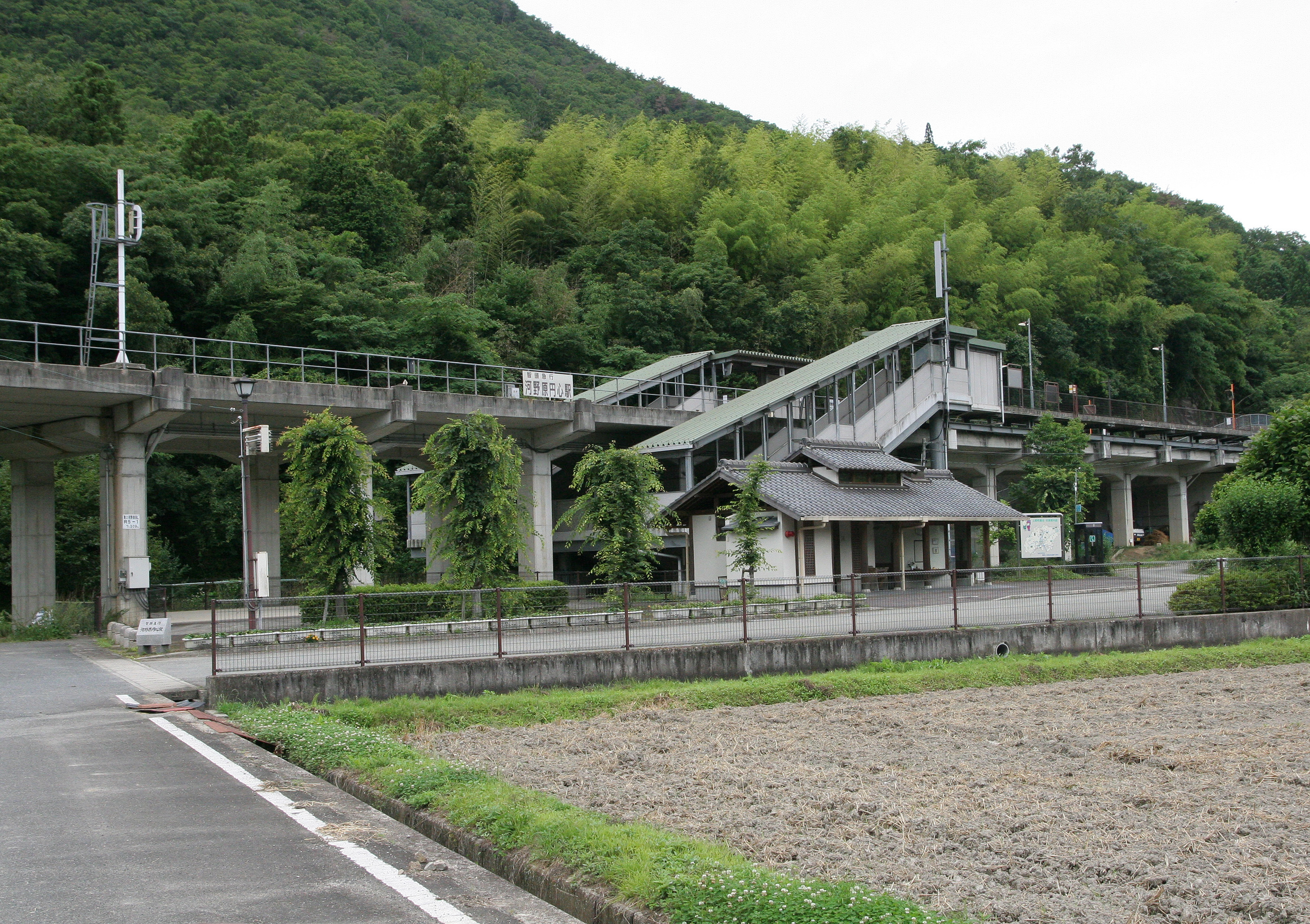 智頭急行 河野原円心駅の全体の様子